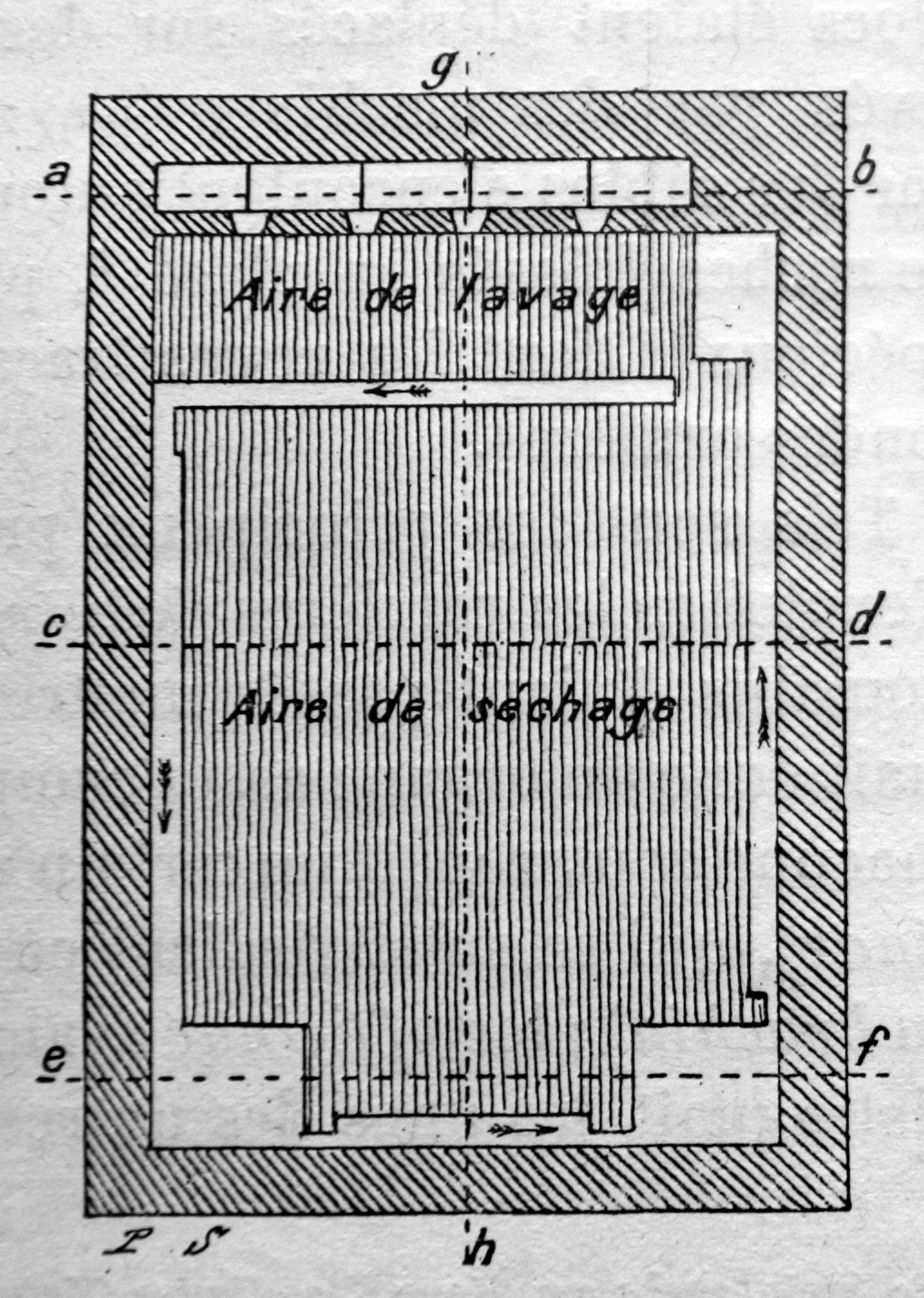 photographie d'une illustration de l'ouvrage libre de droit Charles Daremberg, Edmond Saglio Dictionnaire des antiquités grecques et romaines, tome 3, volume 2, Hachette, 1877-1914, p. 1862